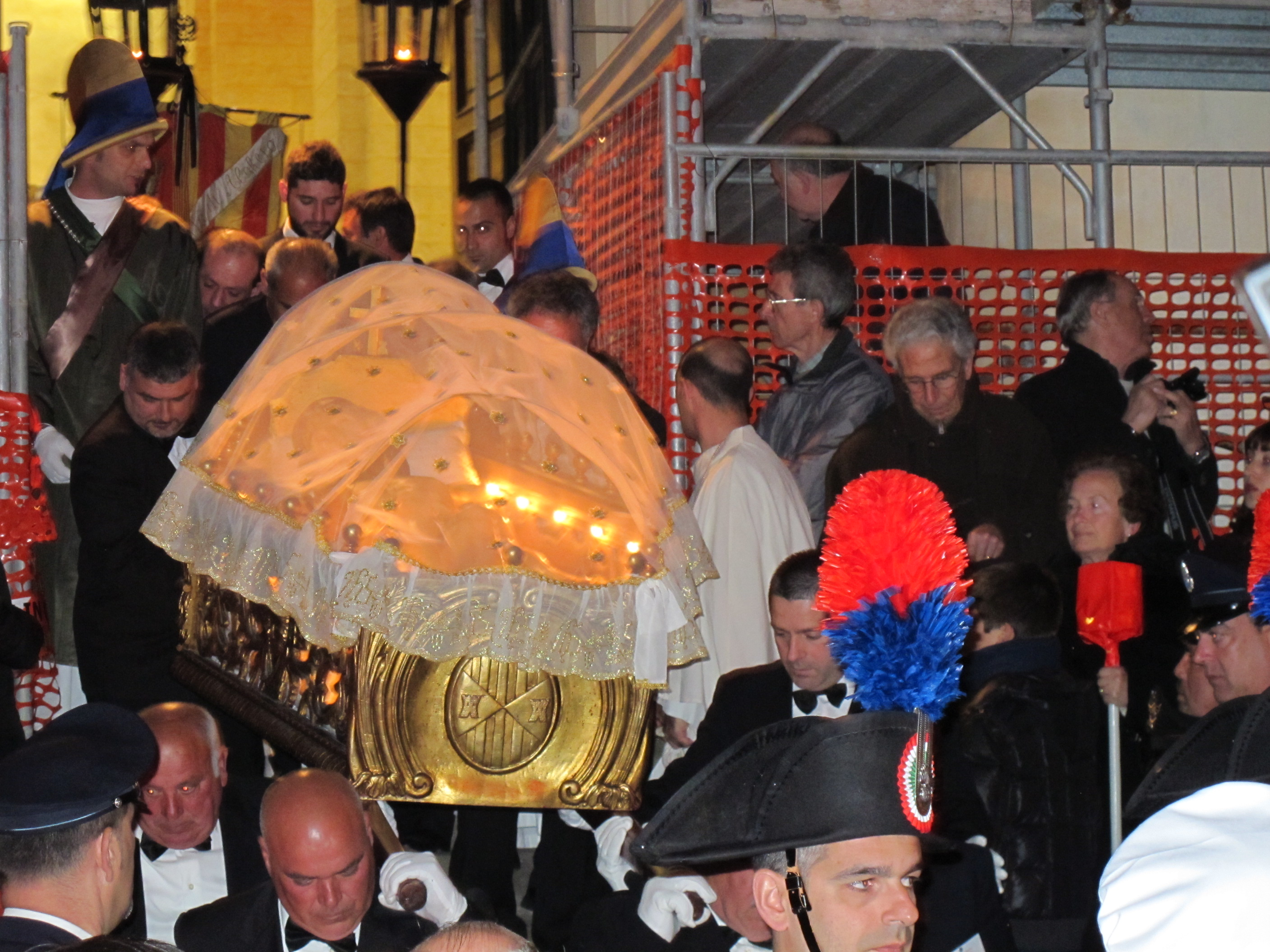 Karfreitagsprozession in Alghero 2010 - Christusfigur im Sarg